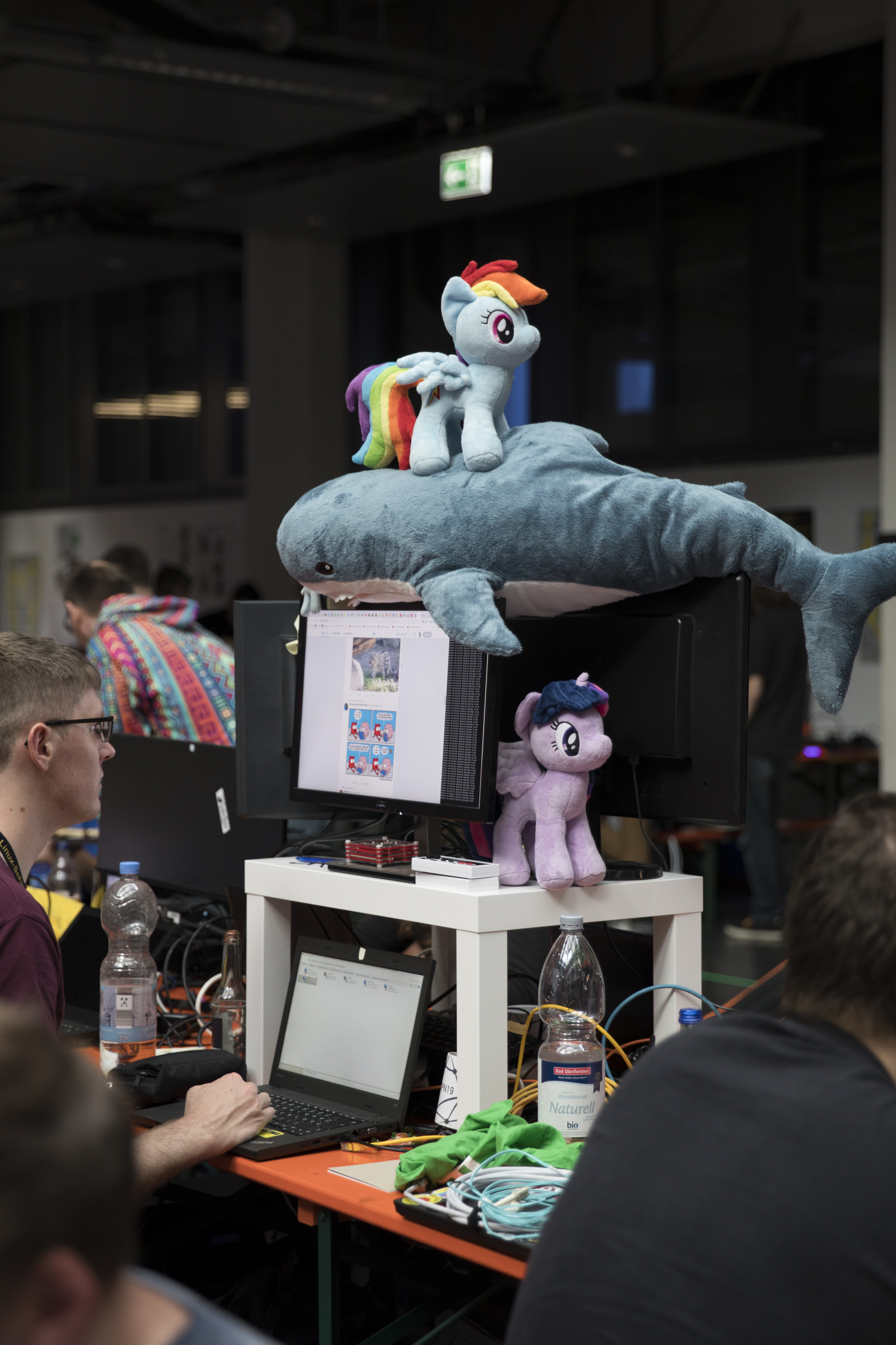 Zentrum für Kunst und Medien Karlsruhe